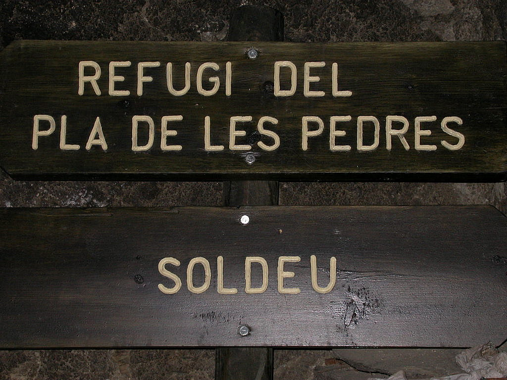 Refuges Andorre